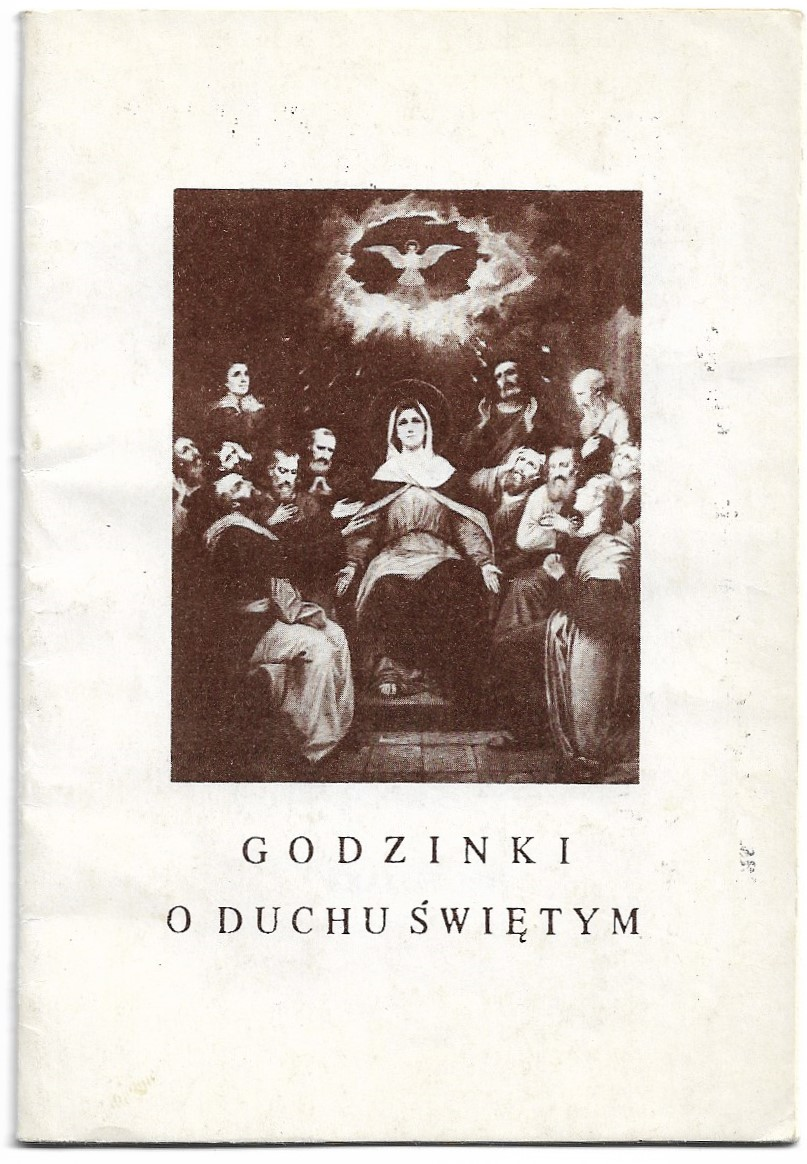 Wydanie z 1989 roku (tekst przepracowany)